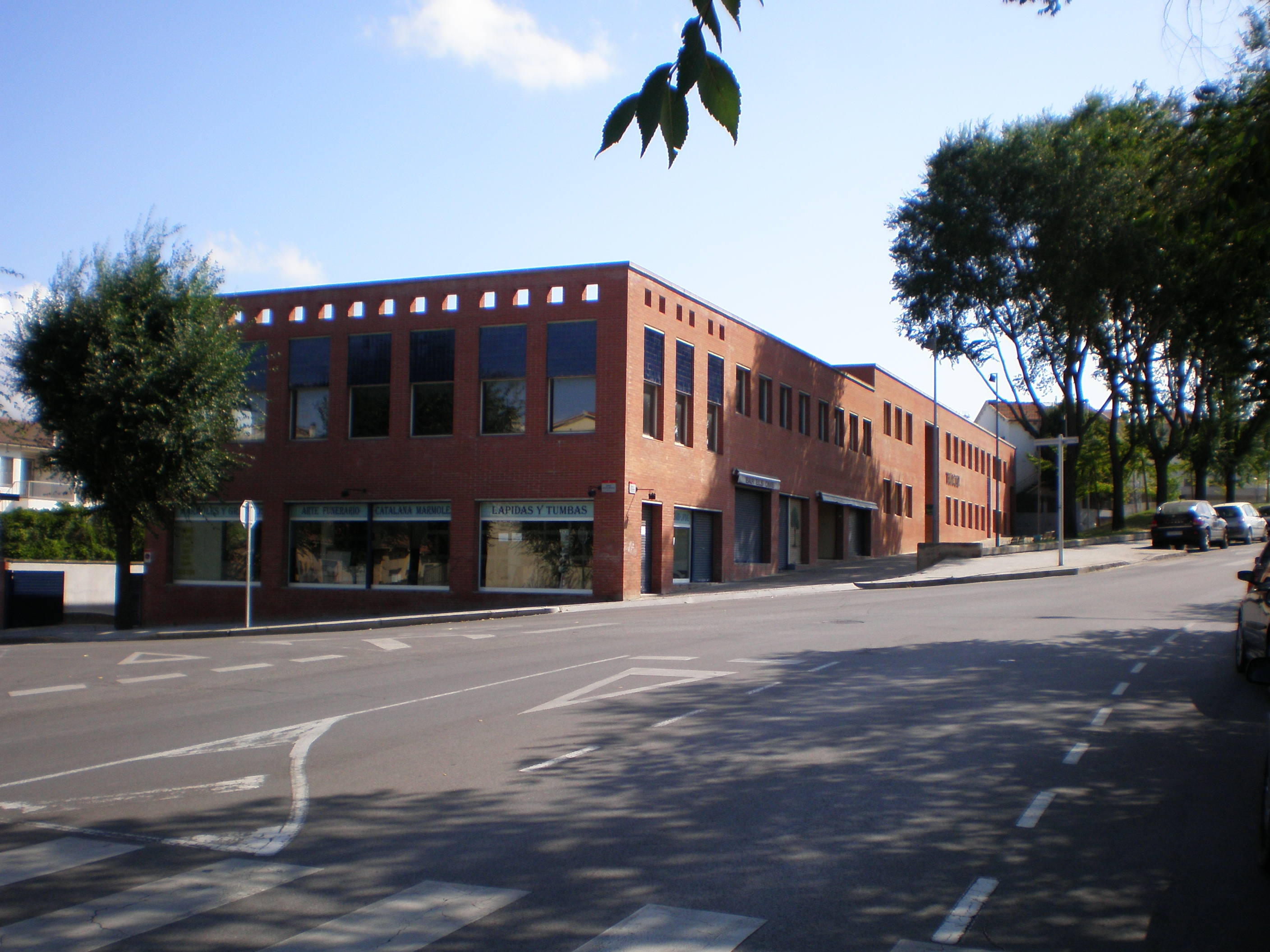 Tanatori de Mollet del Vallès al carrer Granollers.